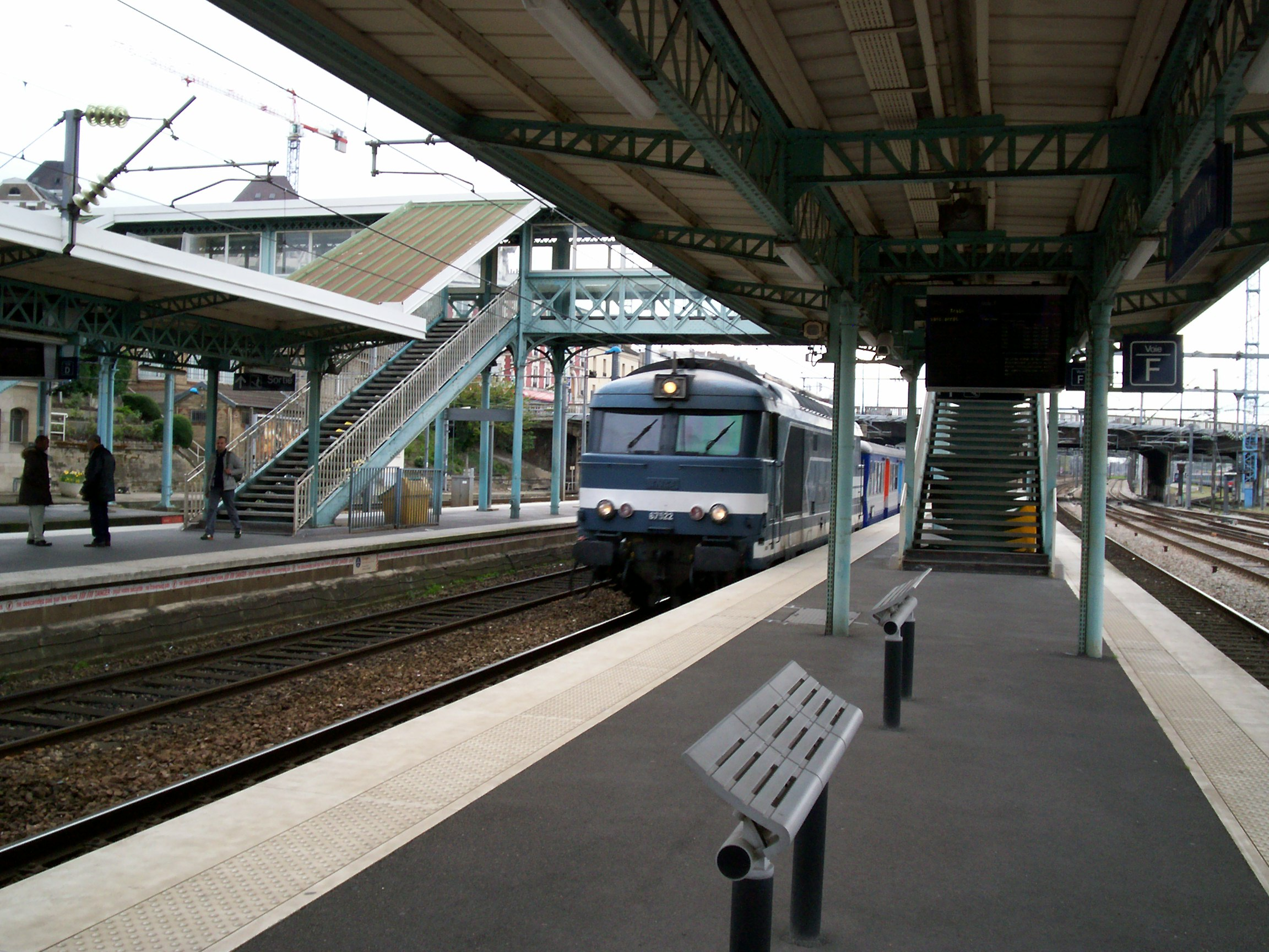 Transilien P - Gare de Pantin